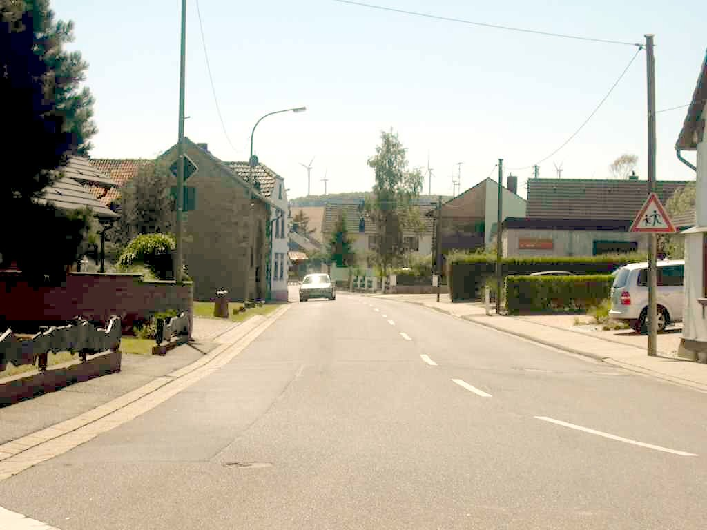 Eppenich